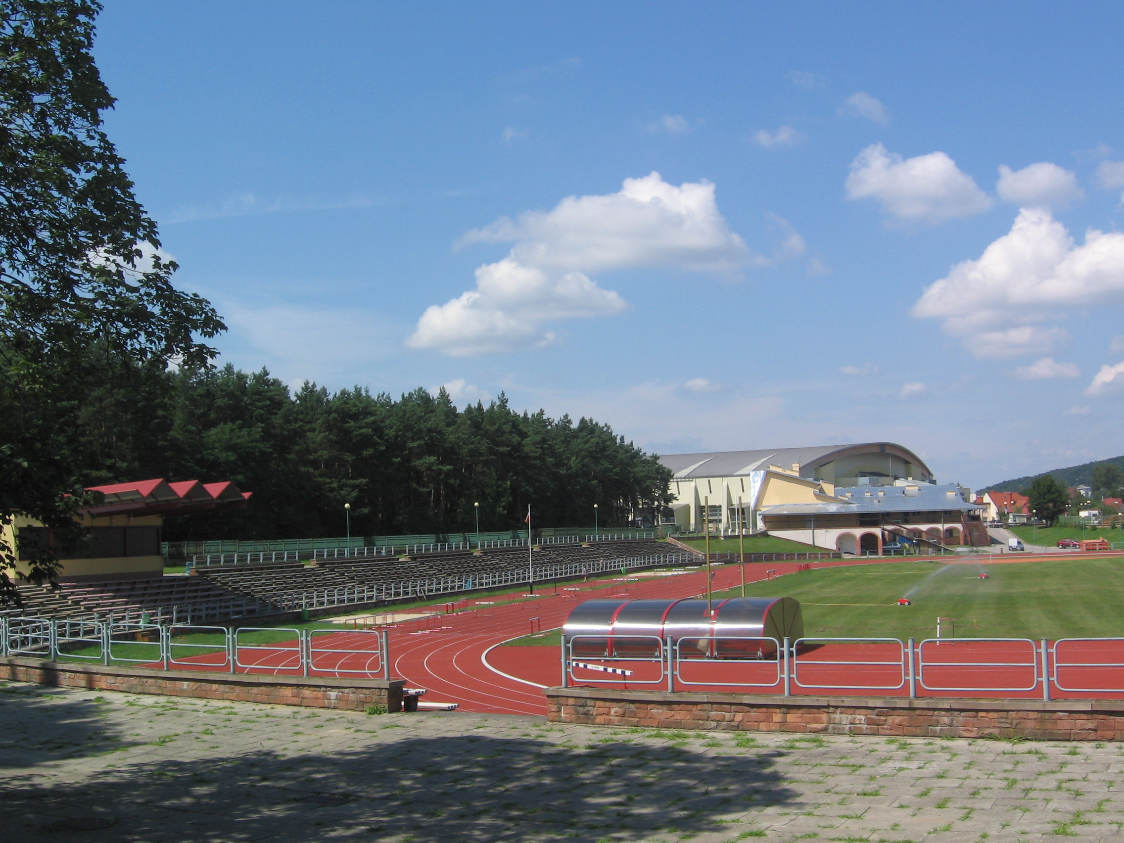 Stadion lekkoatletyczny w Kielcach (Budowlanych, KKL Kielce) w głębi Hala Legionów